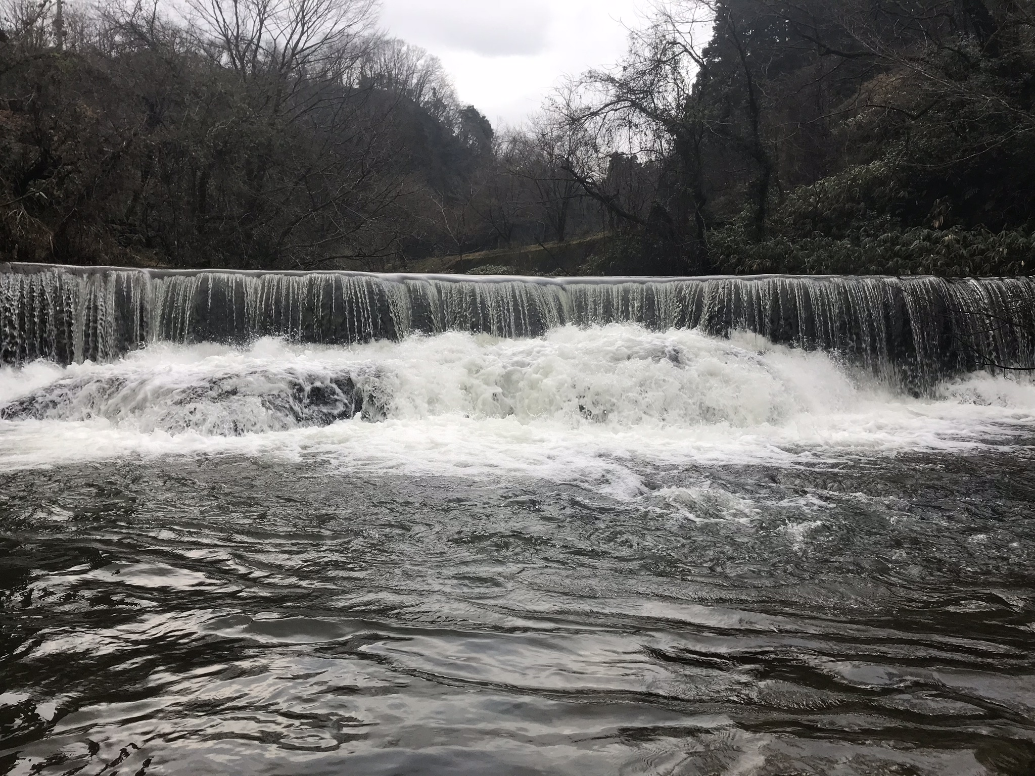 宮島峡の一部